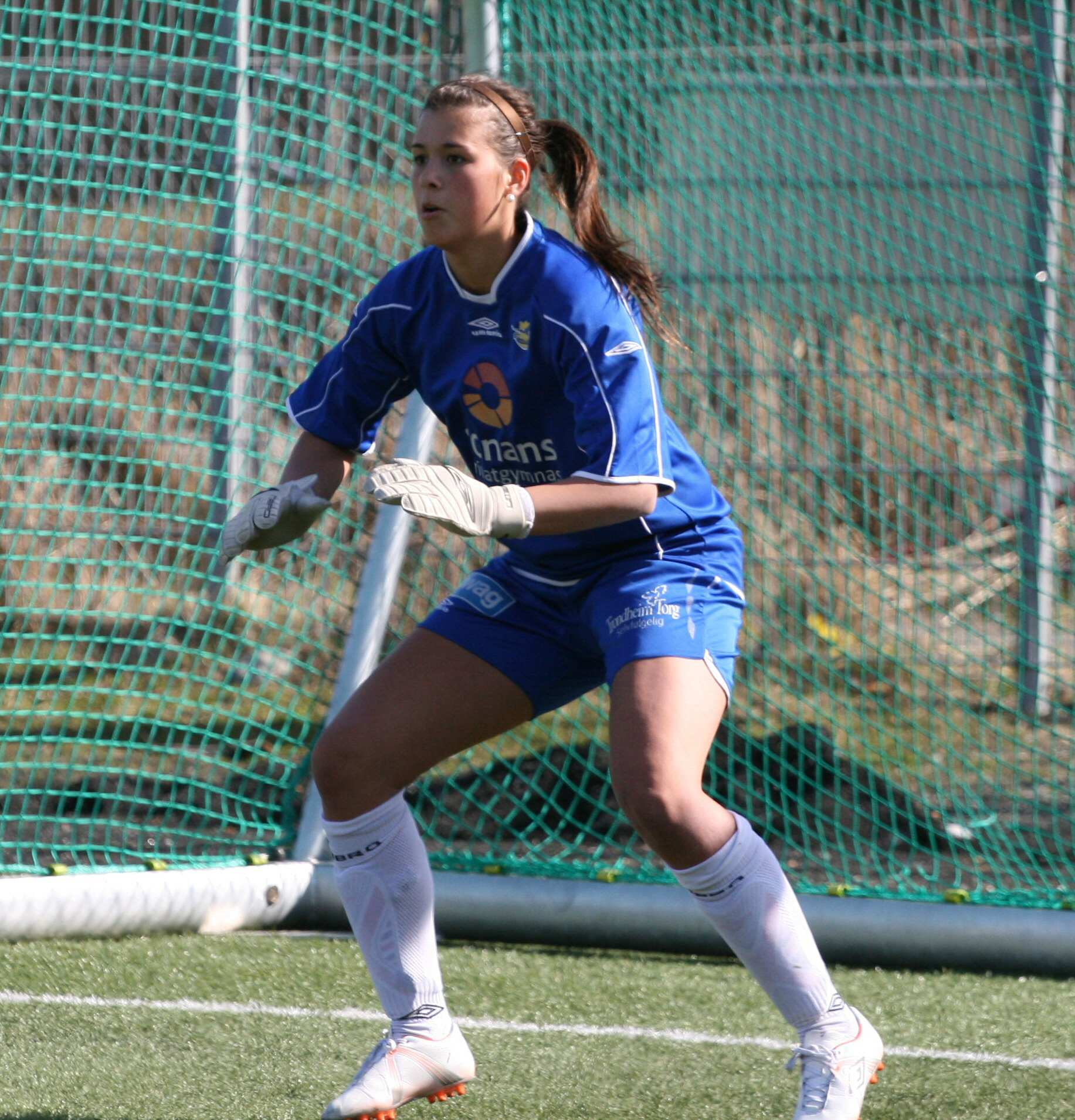 Fotballspilleren Tina Firing